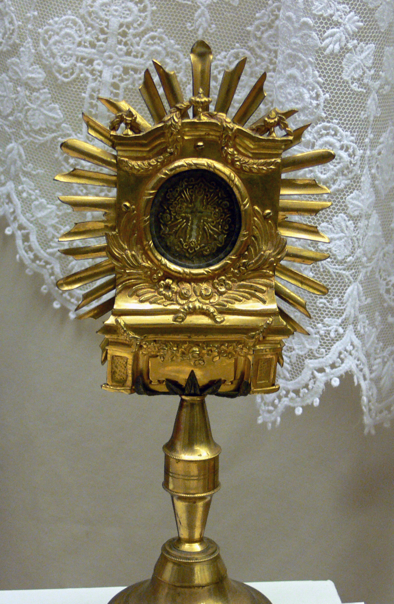 Weingarten, Museum für Klosterkultur Wettersegen, Oberschwaben um 1830 (mit anberührter Kreuzreliquie)